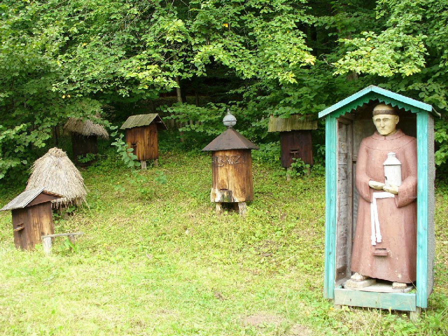 Muzeum Budownictwa Ludowego w Sanoku - zabytkowe ule.